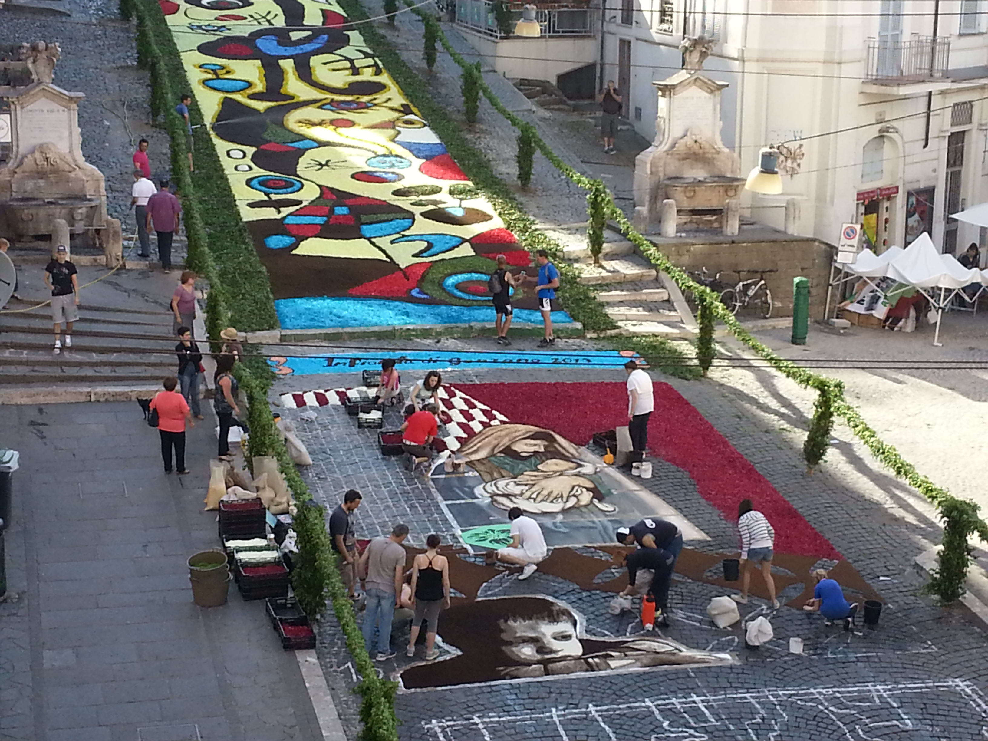 Infiorata di Genzano di Roma 16 giugno 2013. Fasi della preparazione